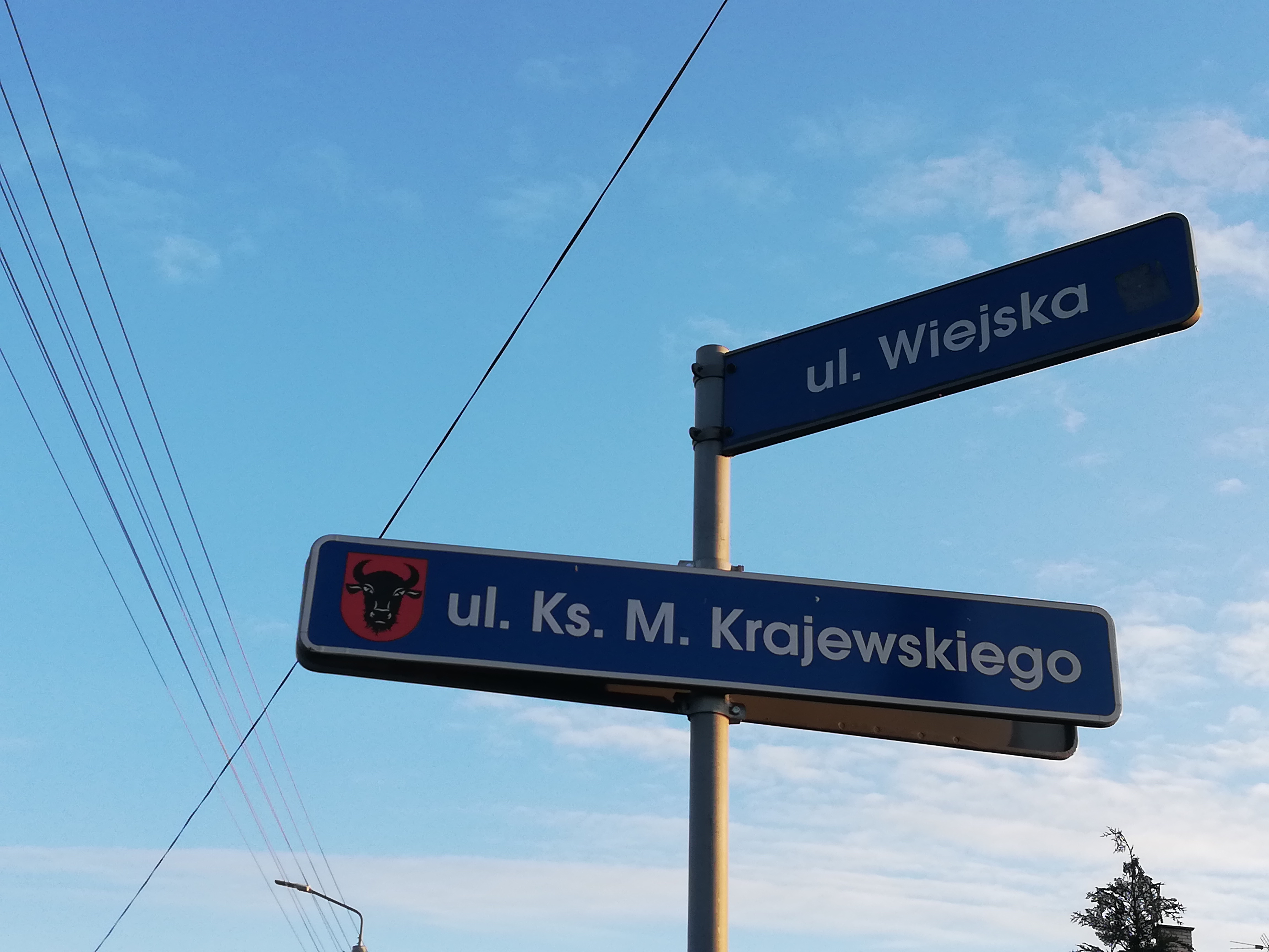 Tabliczka z nazwą ulicy Ks. Marcina Krajewskiego na skrzyżowaniu z ul. Obrońców Zambrowa i W. Raginisa